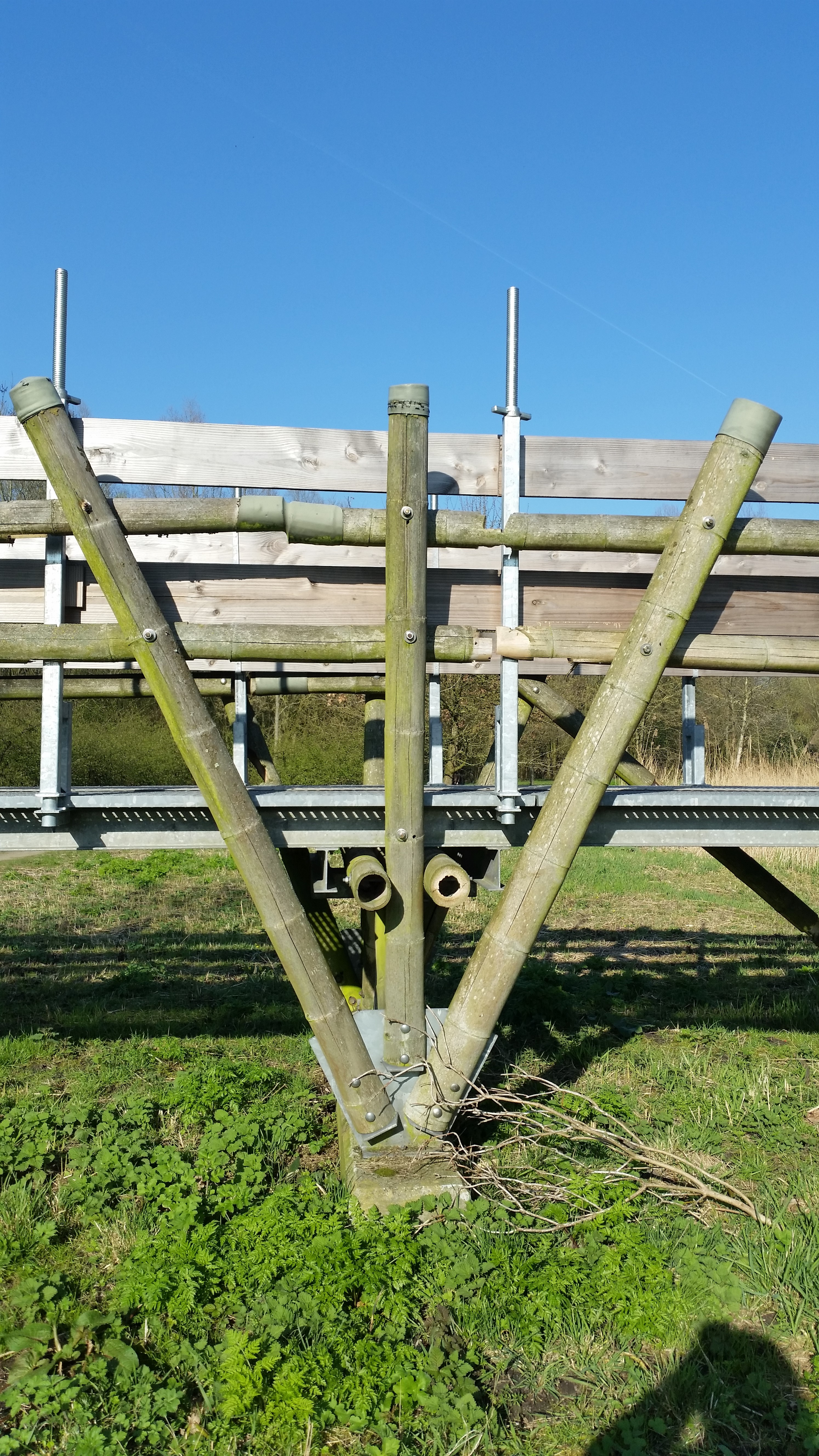 Brugpijler van Brug 1545, Bamboebrug